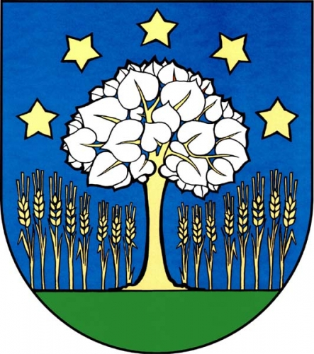 znak, Vlachovice, okres Žďár nad Sázavou